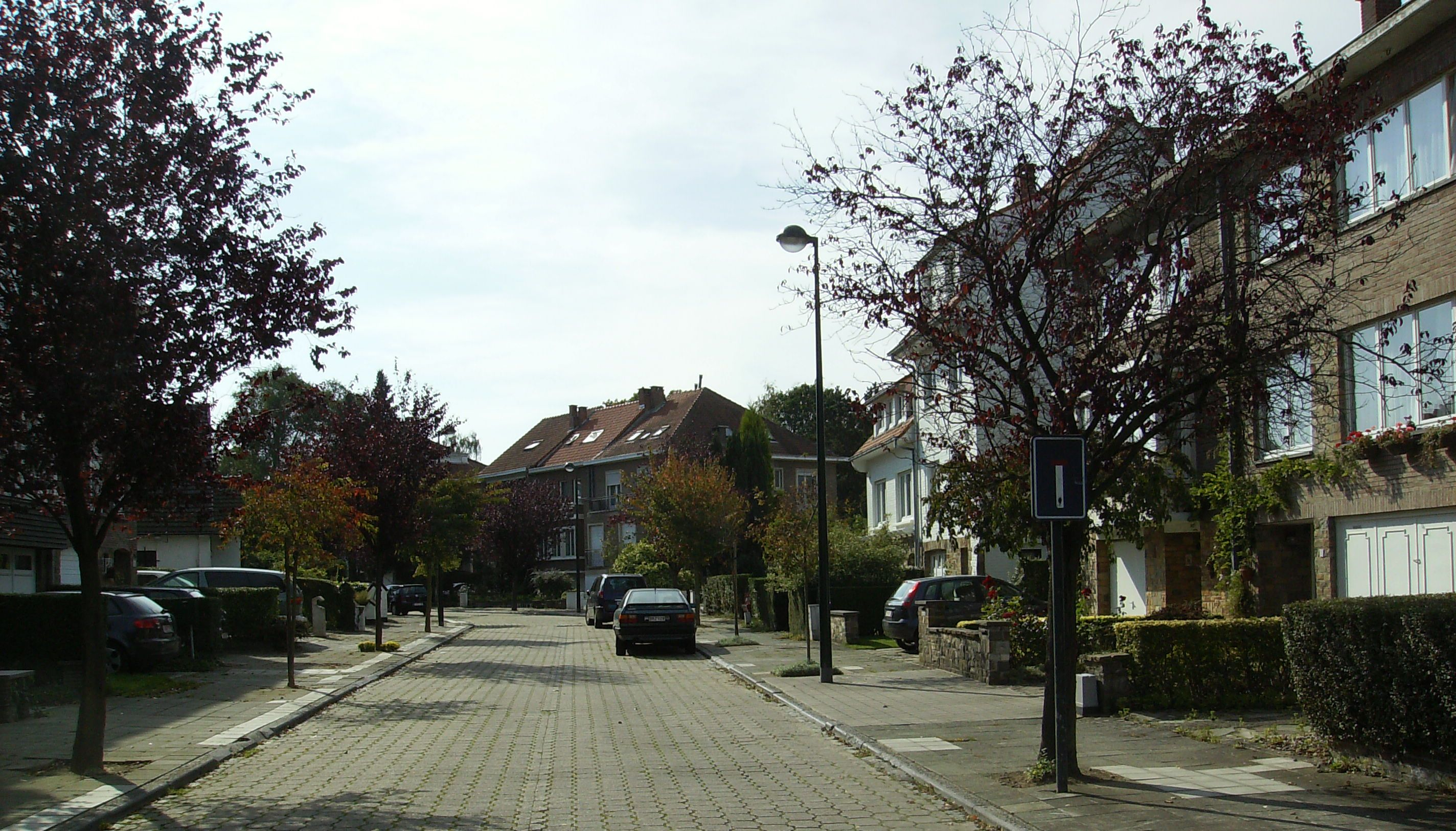 rue Alexis Willem Auderghem